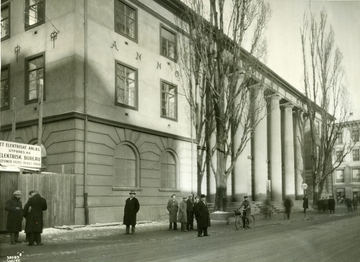 Torggata en vinterdag. Mennesker utenfor det nyoppførte Torggata bad. Plankegjedet på venstre side reguleringen av Vaskeribakken til Henrik Ibsens gate (idag Hammersborggata). Badetomten og det gamle badet ble vesentlig beskåret.